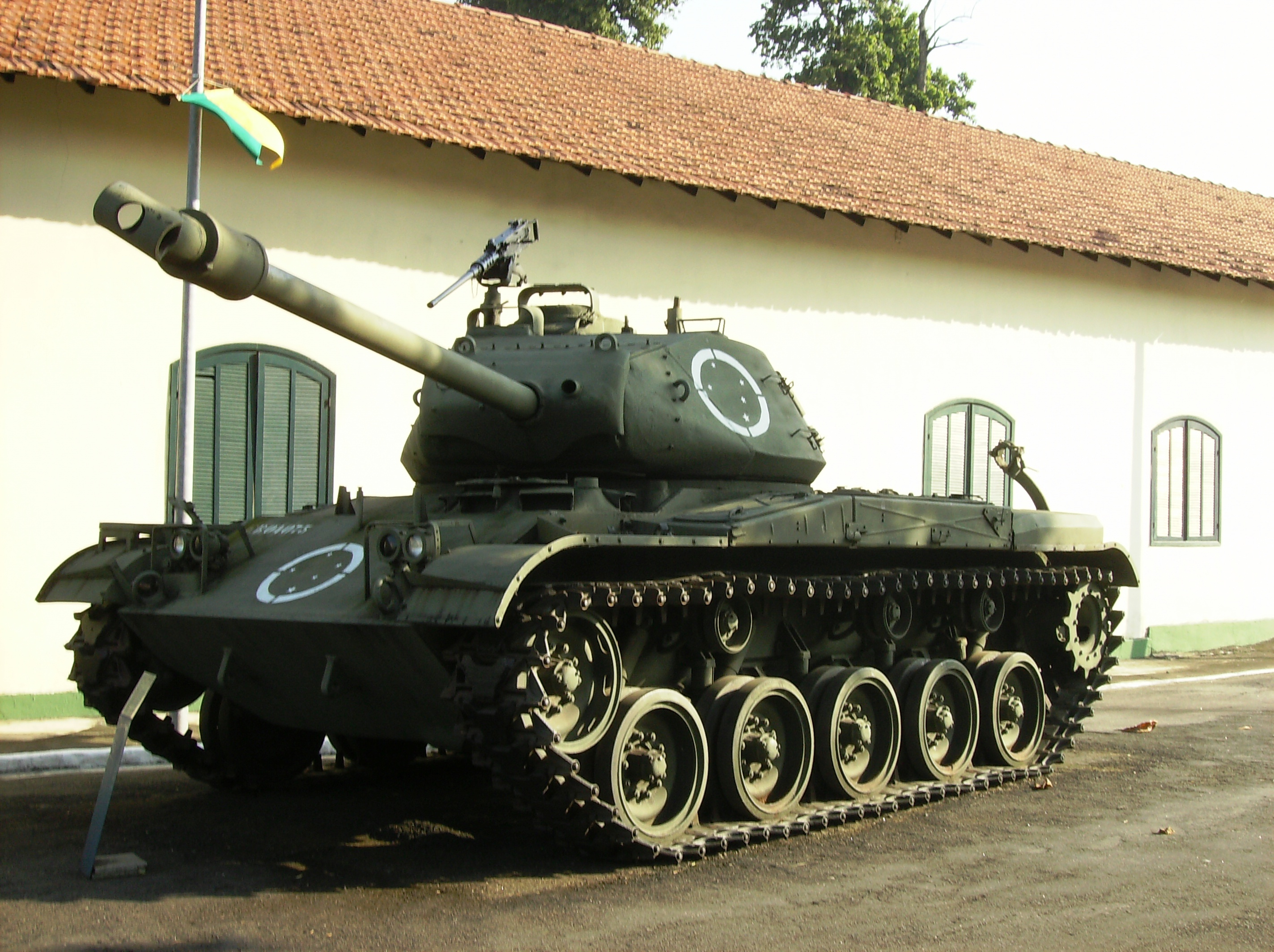 Museu Militar Conde de Linhares, Rio de Janeiro, Brasil: tanque M41 Walker Bulldog.